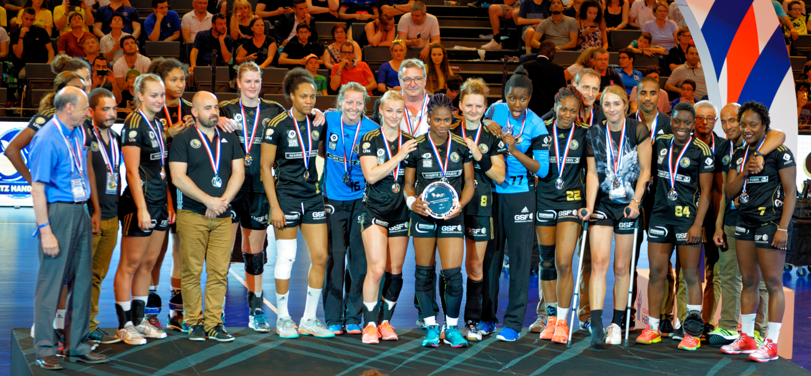 Issy Paris Hand, finaliste de la Coupe de France de handball 2016-17 entre Metz Handball et Issy Paris Hand. A Bercy, le 27 mai 2017.